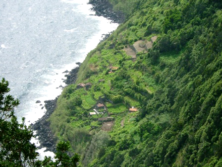 Vista parcial da Fajã da Fragueira, ilha de São Jorge, Açores, Portugal (Não a dos Bodes).